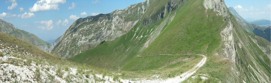 Vista del p. cattivo